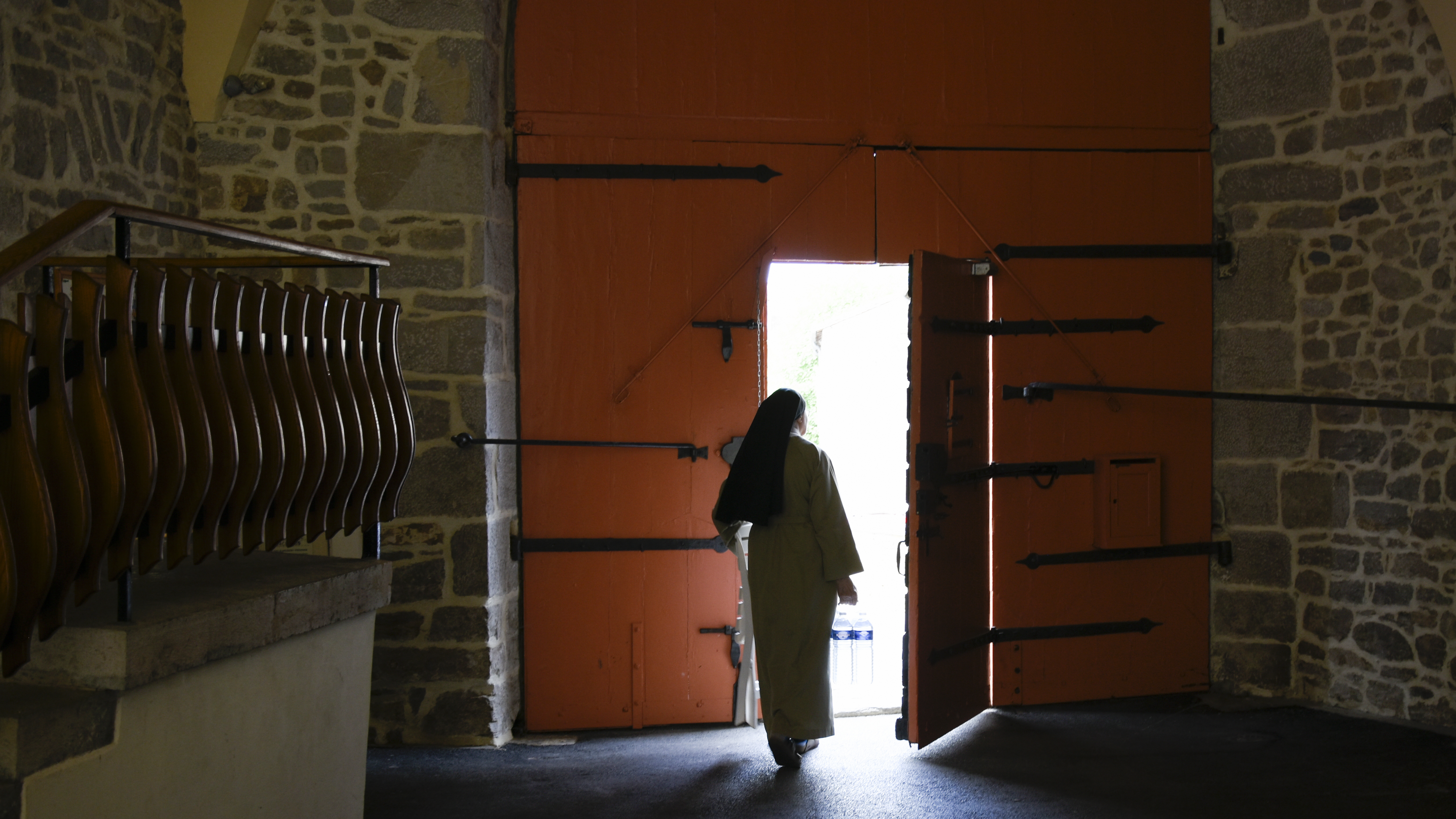 Sint-Claraklooster (Poligny), Frankrijk - een claris in het klooster